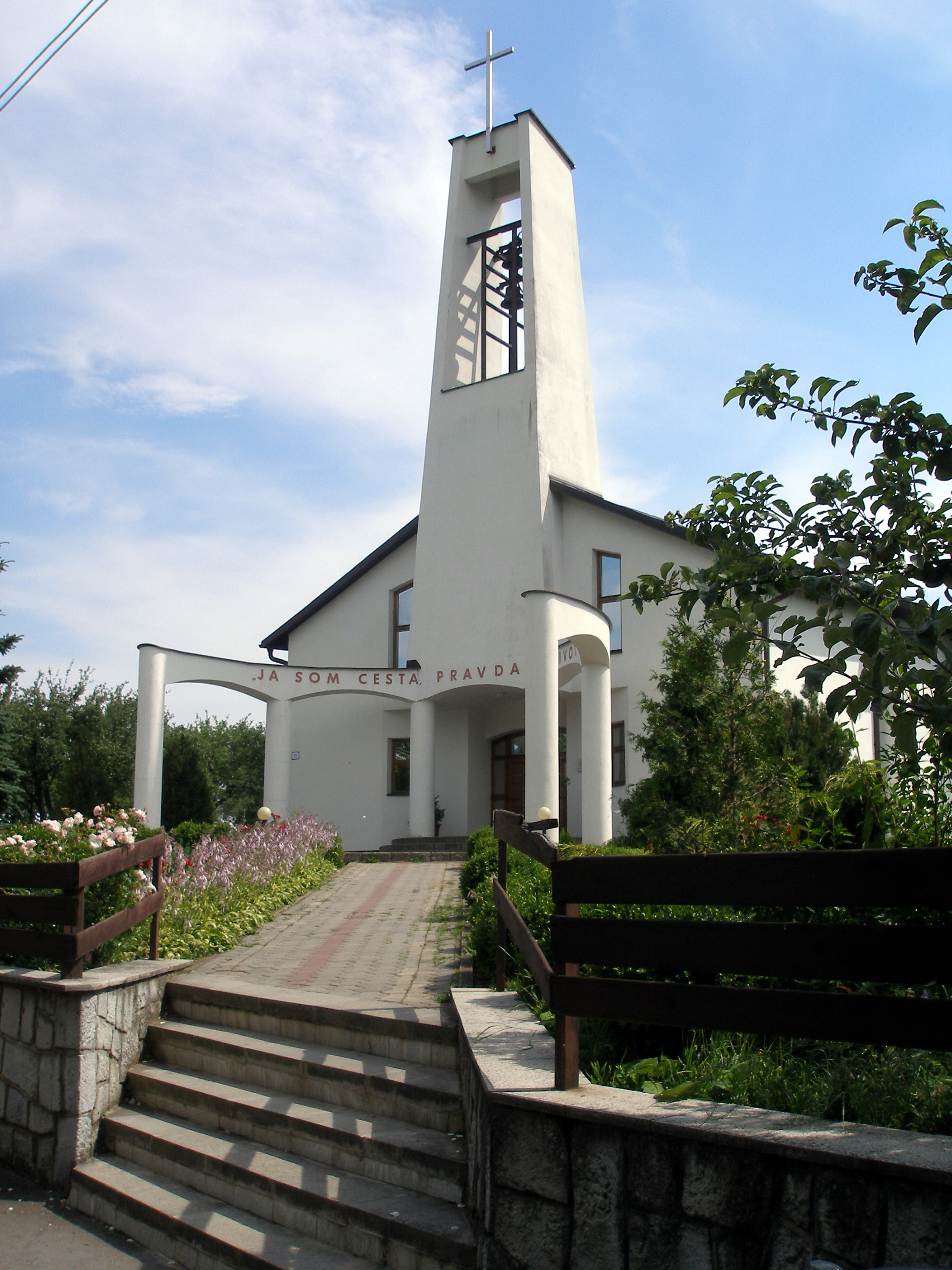 Kostol v obci Bodovce okres Sabinov, región Šariš